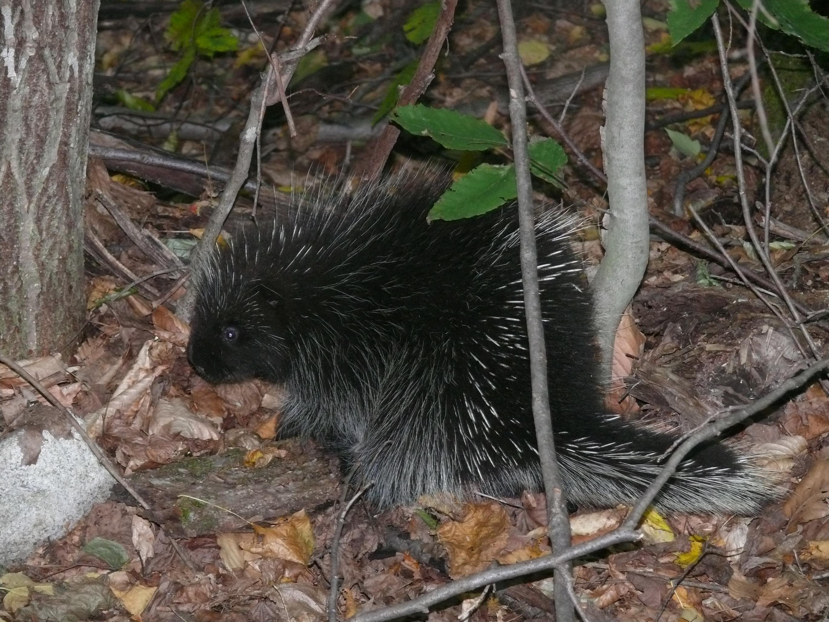 Porc-épic d'Amérique photographié dans une forêt à Litchfield, Québec